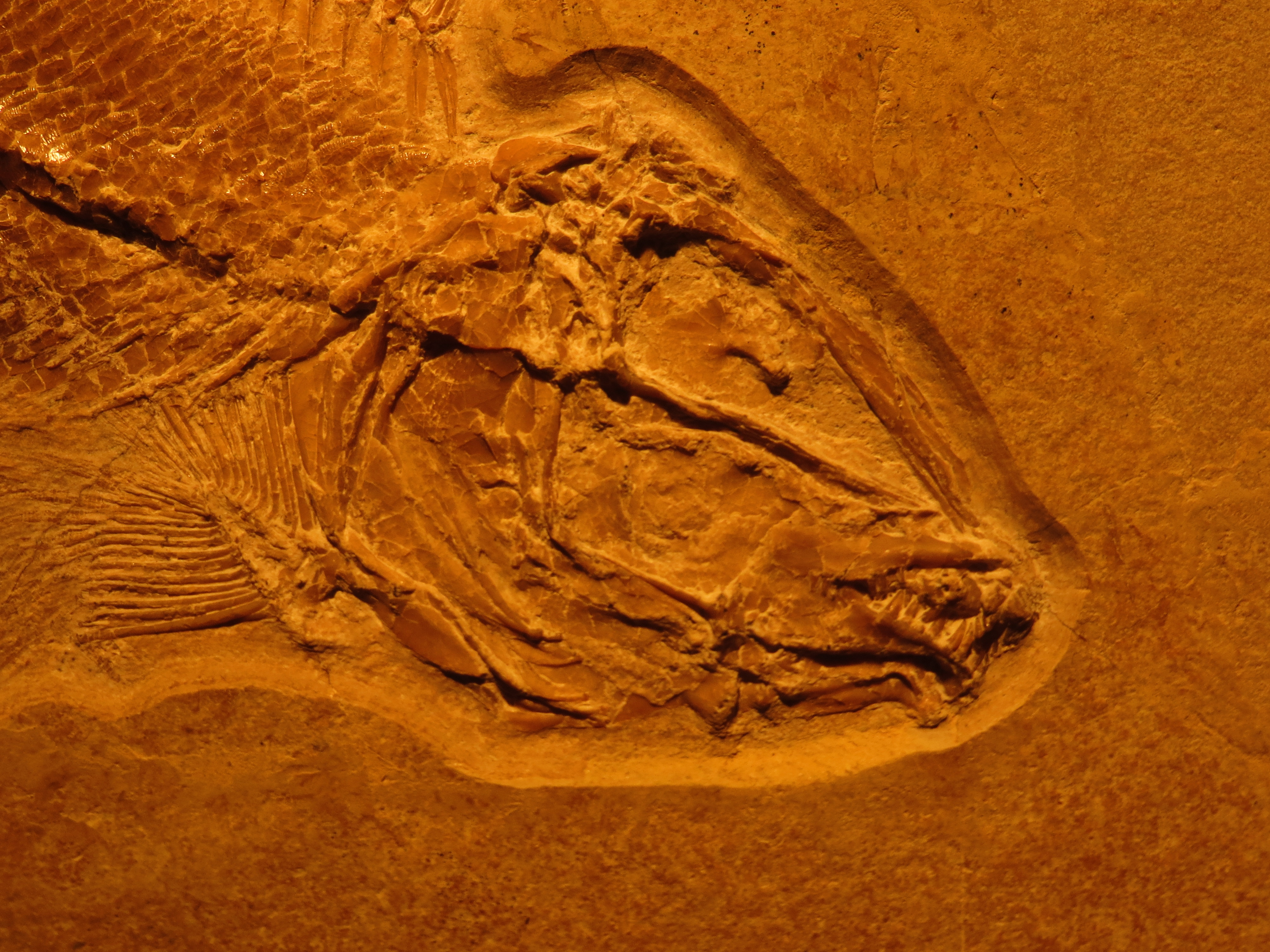 Took the picture at Natural History Museum in Bamberg